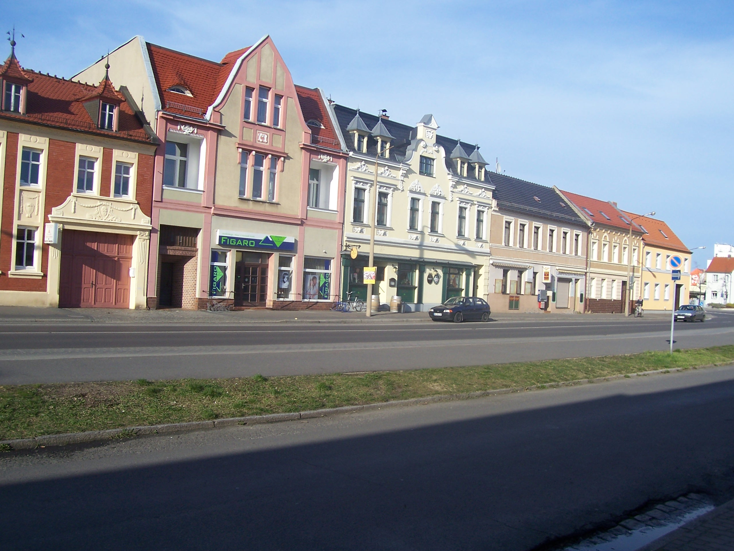 Jüttendorf